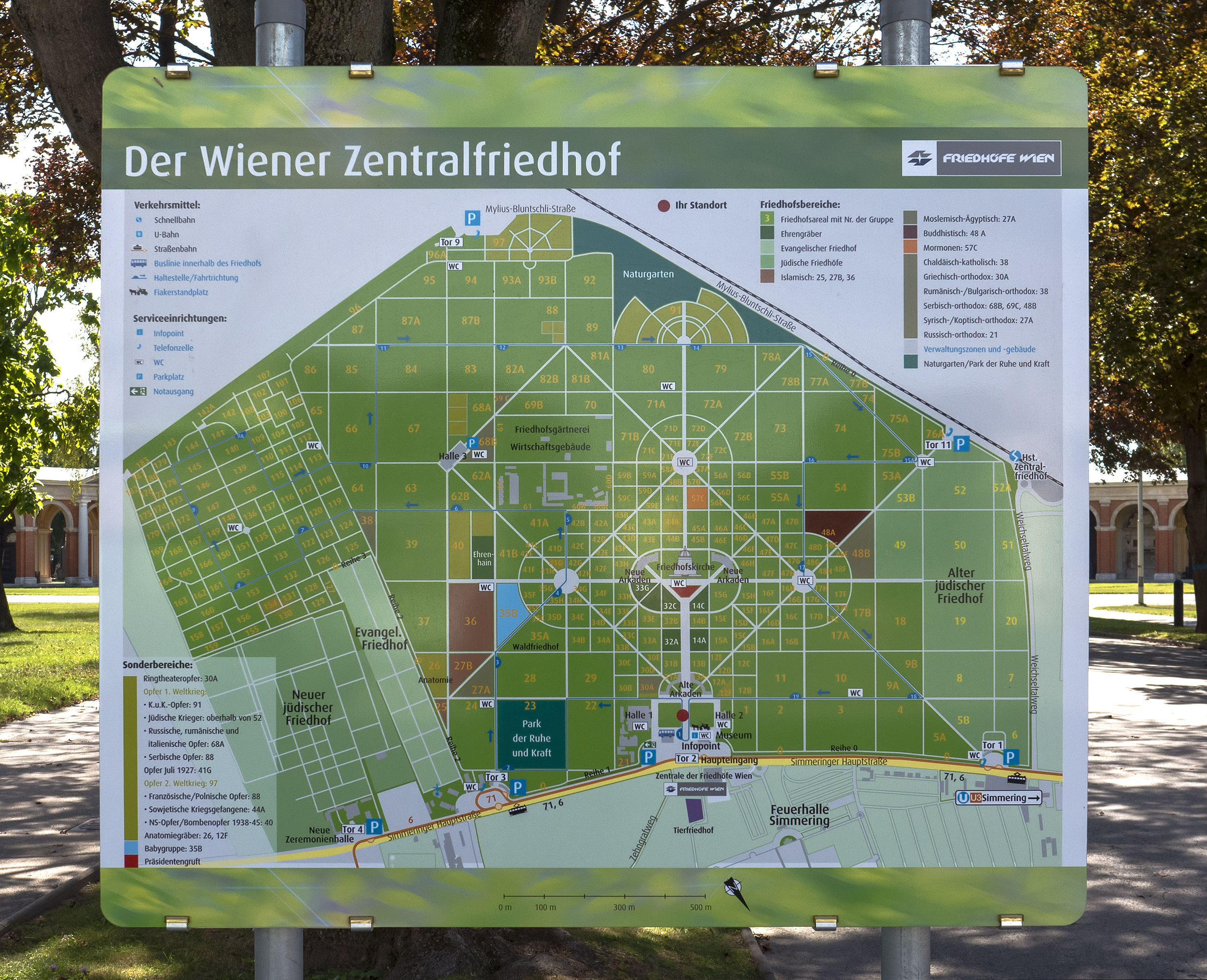 Wiener Zentralfriedhof in Wien 11, Übersichtsplan